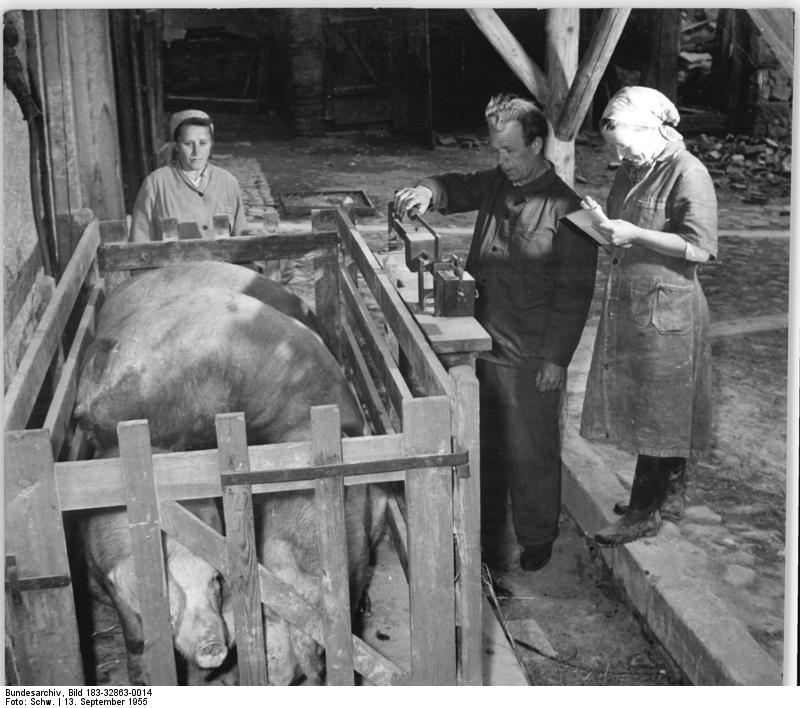 Zentralbild-Schw. Wjt-Qu 13.9.1955 Mehr Schweinefleisch durch vorbildliche Viehhaltung und Viehpflege LFG "Friedrich Engels" in Scharfenberg, Kreis Meißen. Durch umsichtiges, planvolles Arbeiten konnte die LFG "Friedrich Engels" in Scharfenberg den Plan für die Vermehrung des Viehbestandes bei weitem übererfüllen. Besonders in der Schweinehaltung, der Zucht von gut essbaren Schweinerassen und dem damit verbundenen Aufbau sauberer Stallungen leistet die LPG, auf der die neuesten Erkenntnisse der Wissenschaft auf dem Gebiet der Viehzucht angewendet werden, ausserordentliches. UBz: Durch monatliche Gewichtskontrolle wird der tägliche Zuwachs der Mastschweine ermittelt und danach Arbeitseinheiten errechnet. (Schweinemeister Eschmann und die beiden Viehpflegerinnen Hildegard Schneider und Hedwig Löffel beim Wiegen der Mastschweine.